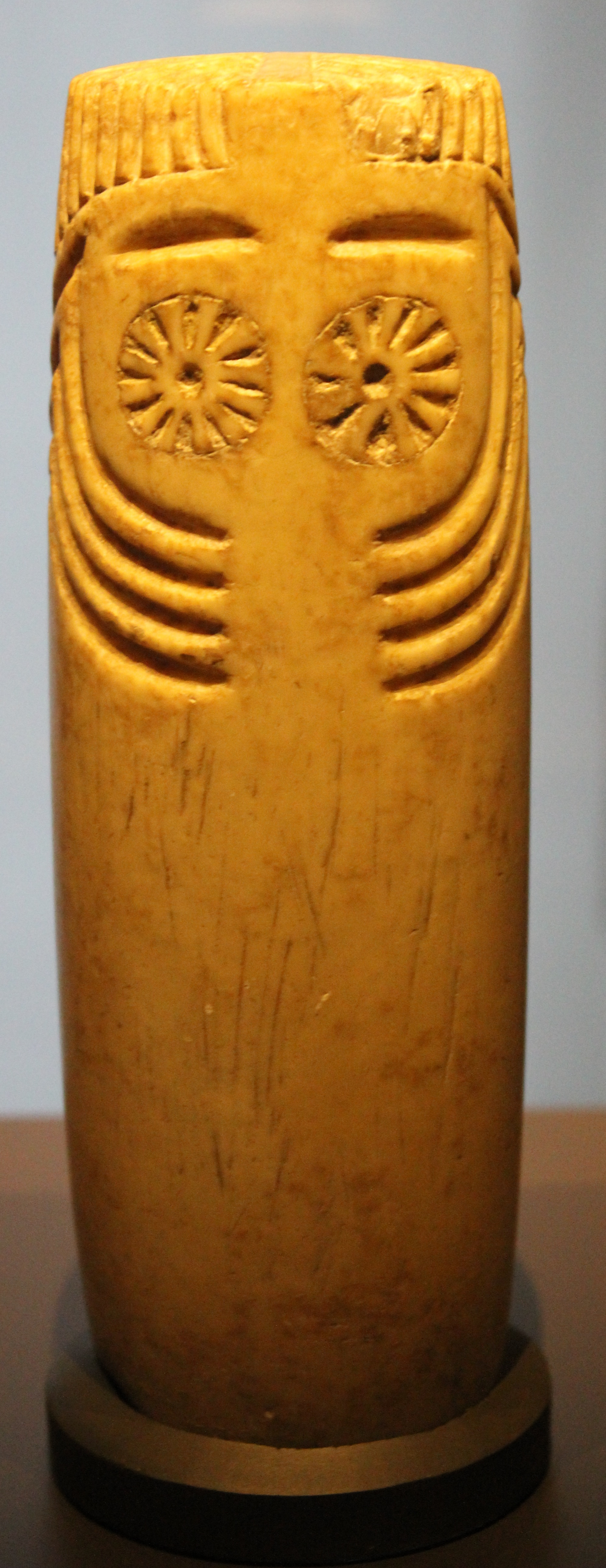 Madrid, M.A.N. el denominado "ídolo de Extremadura"